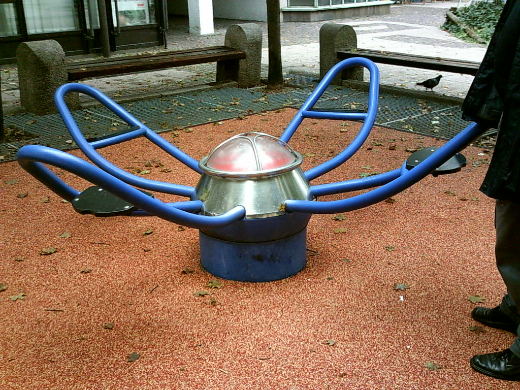 Geduldsspiel als Element der Straßengestaltung, selbst fotografiert, 2005